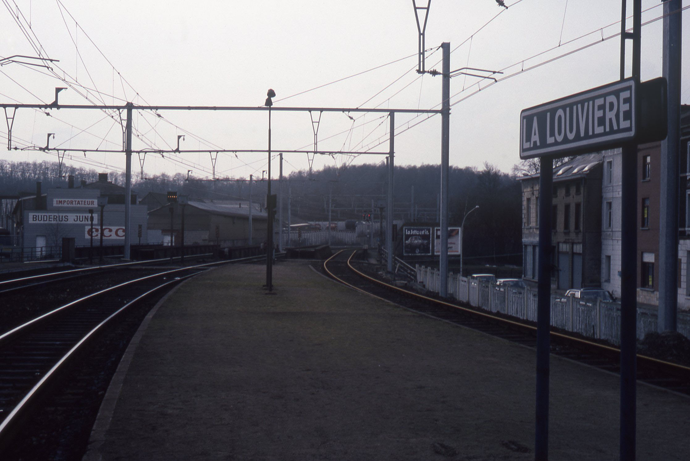 La Louvière station in 1980